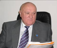 Таланчук Петро Михайлович